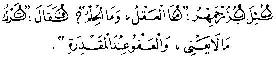 نمونه خط فاخر تاجی